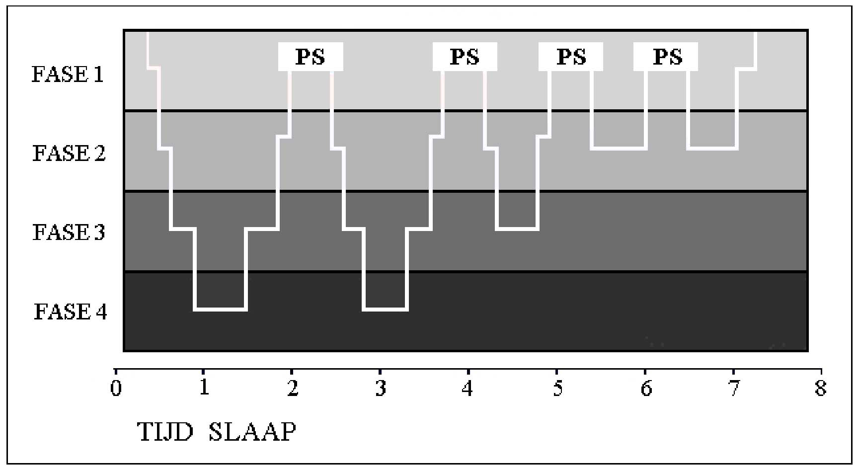 In deze afbeelding staat de tijd die de gemiddelde gezonde volwassen slaper in de verschillende slaapfases doorbrengt in fase 1 tot en 4 non-REM slaap en in de paradoxale slaap (aangegeven met PS in afbeelding) oftewel: REM slaap.